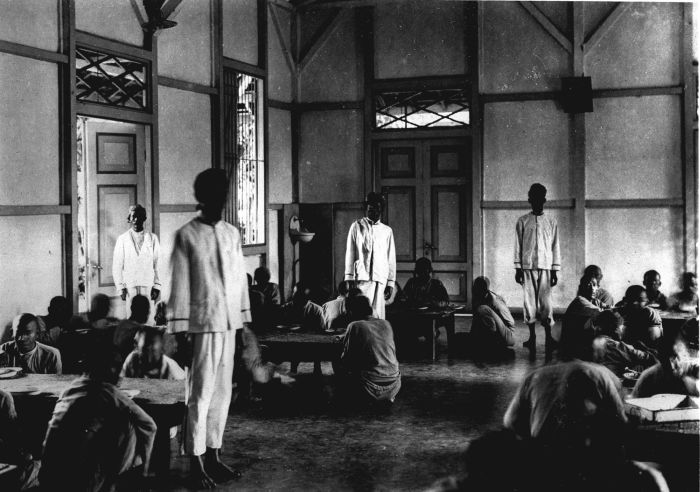 Foto. Krankzinnigengesticht Soember Porong 23 juni 1902 - 23 juni 1922. Patiënten van psychiatrisch ziekenhuis Soember Porrong aan het middagmaal